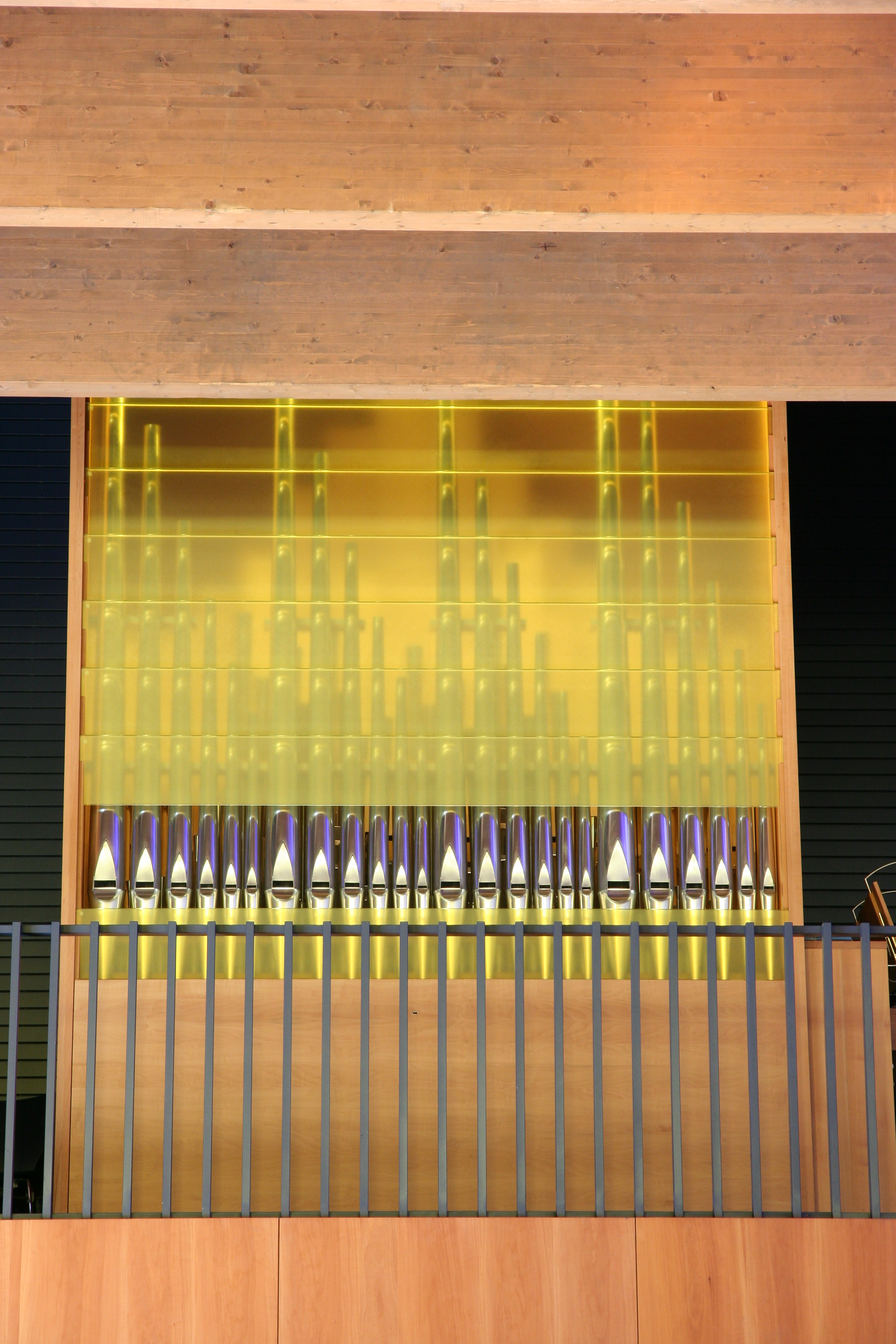 Römisch-katholische Kapelle Bruder Klaus in Wädenswil-Au, Orgel